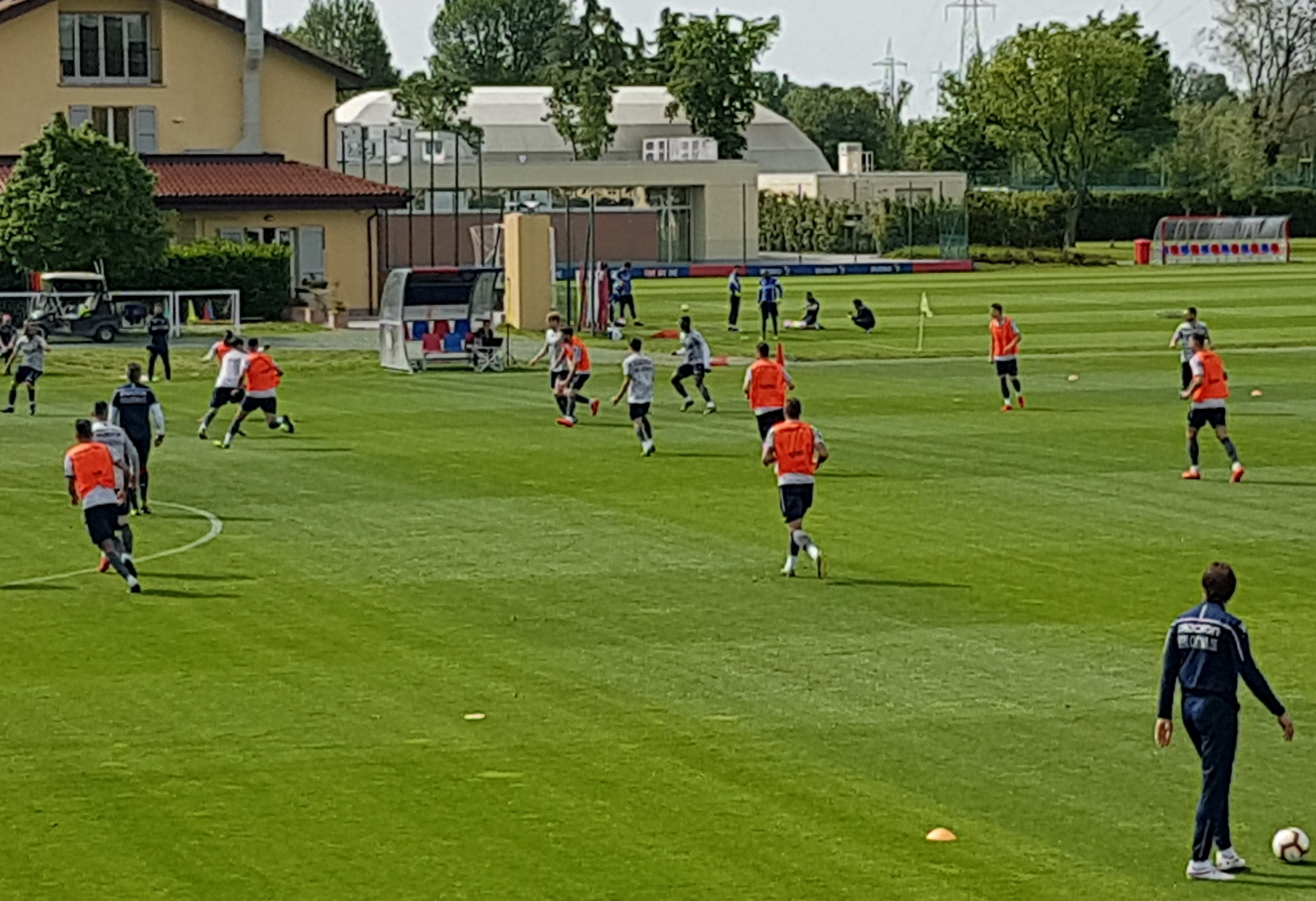 Allenamento del Bologna FC 1909